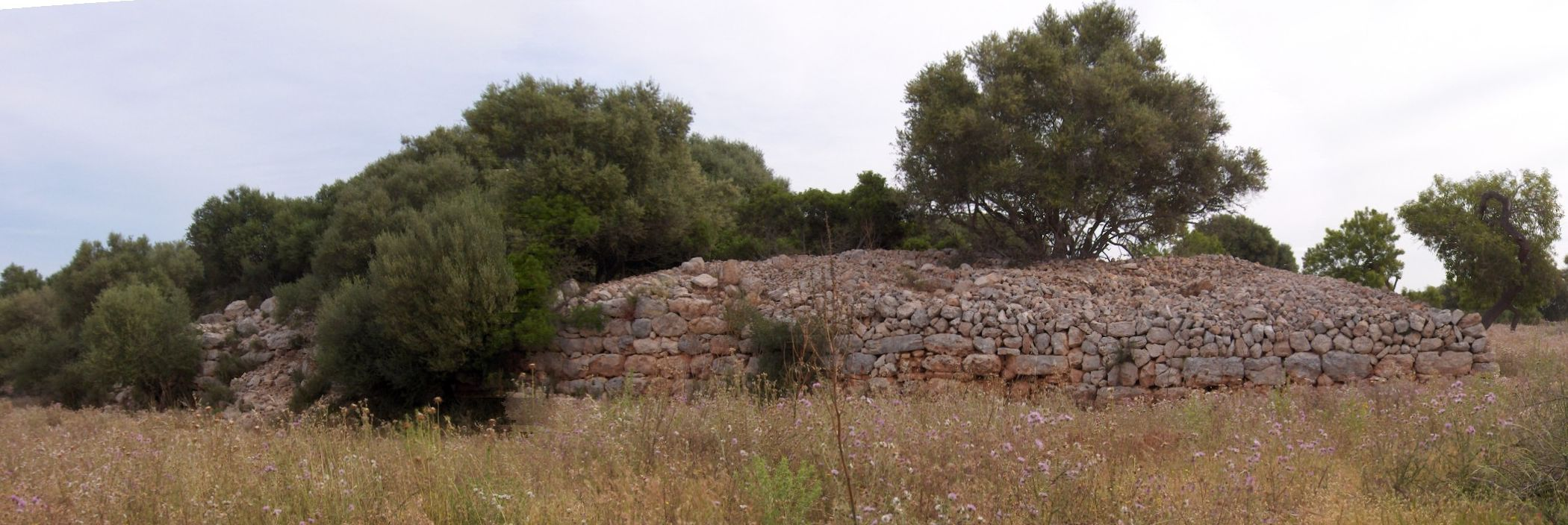 Restes del mur prehistòric del poblat talaiòtic d'es Pedregar, a la possessió del mateix nom, al terme de Llucmajor, Mallorca.